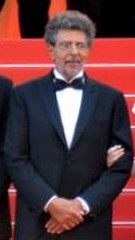 Gabriel Yared au festival de Cannes 2017